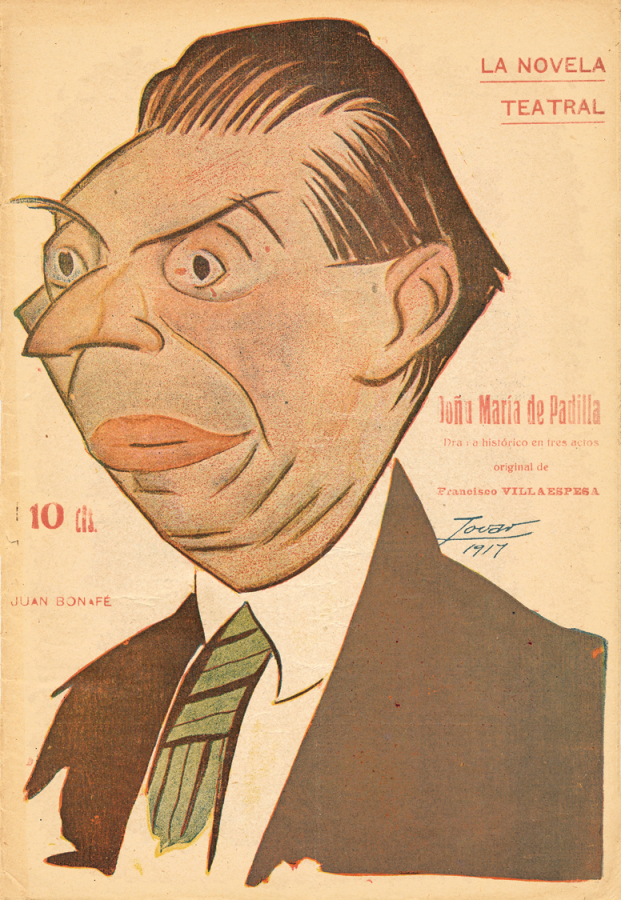 Caricatura de Juan Bonafé.